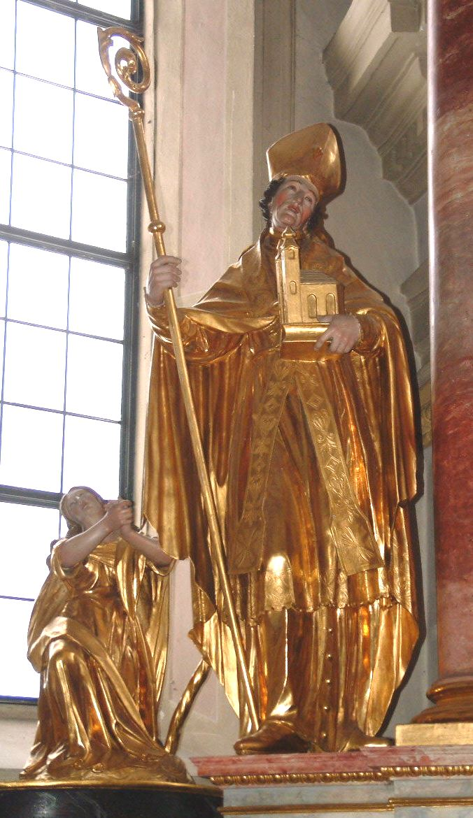 Hl. Virgil, Statue von Joseph Haid am Altar der Pfarrkirche Kirchdorf in Tirol